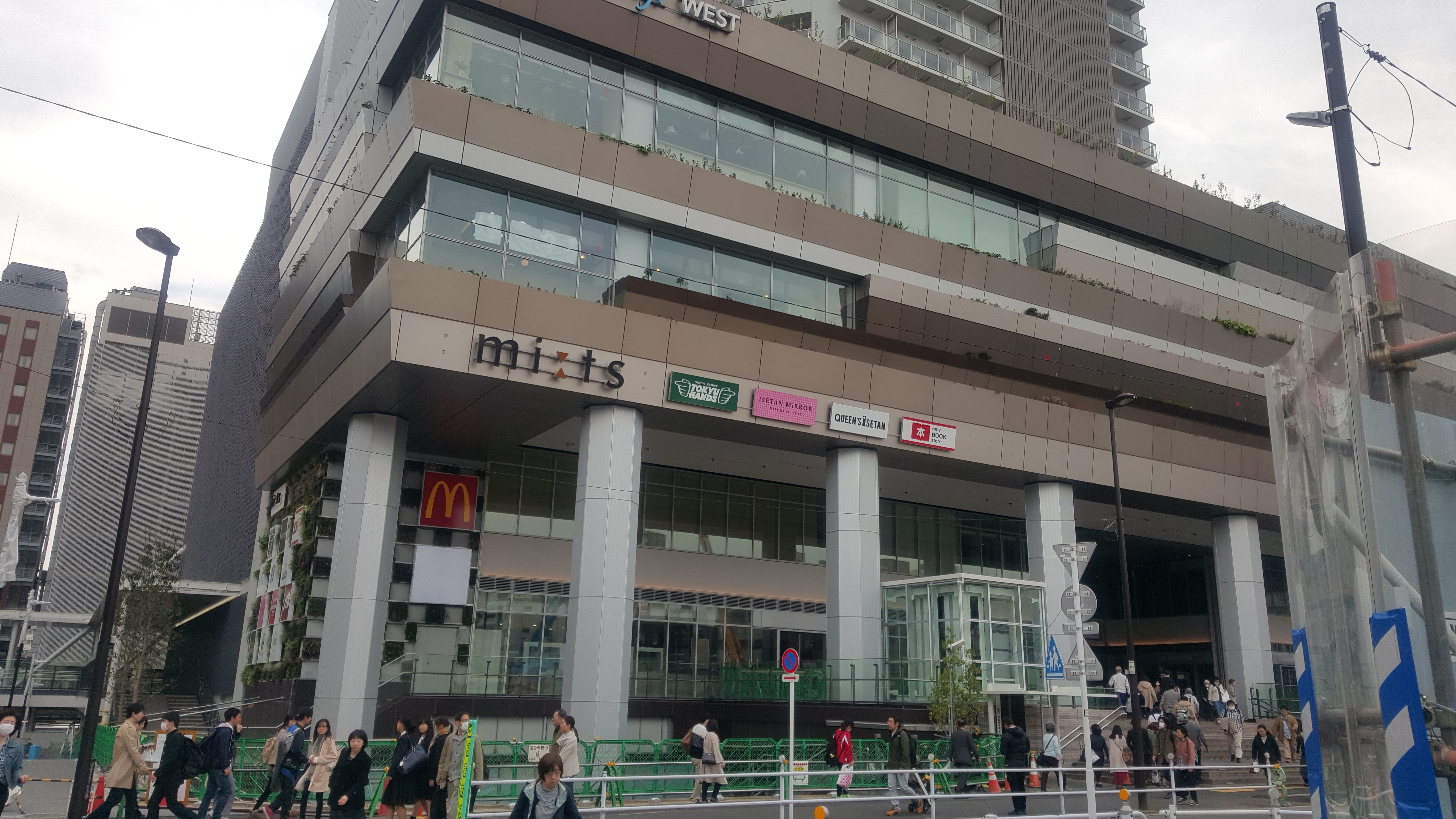 国分寺駅20180315